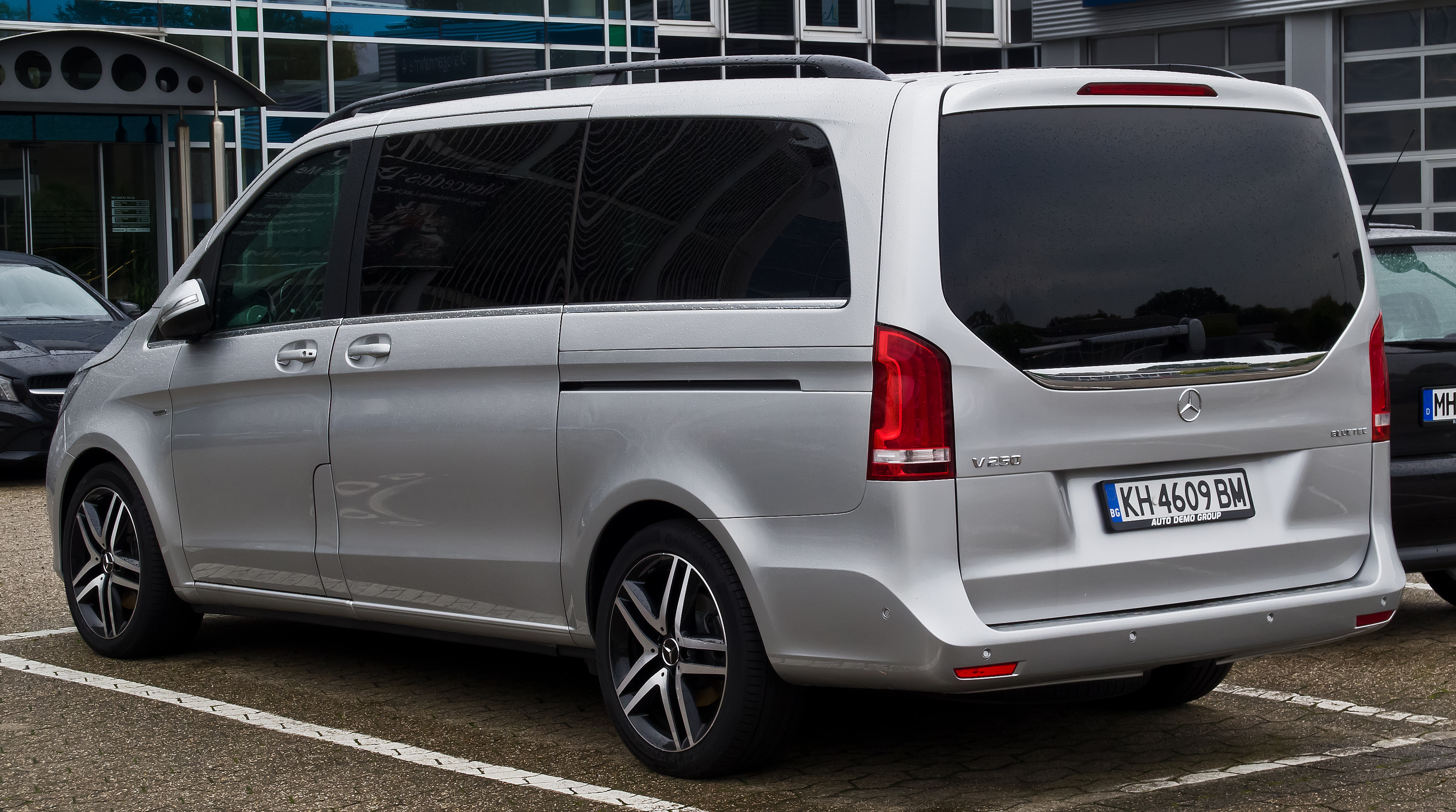 Mercedes-Benz V 250 BlueTEC Edition 1 Lang (V 447)